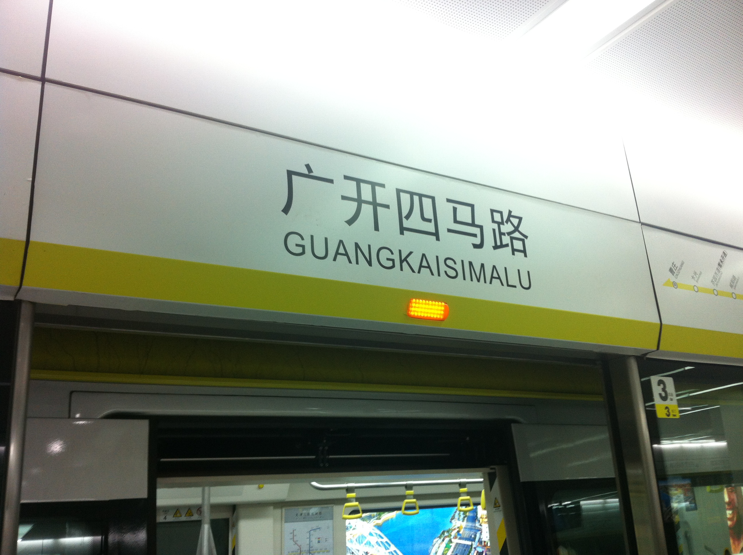 中文（中国大陆）: 广开四马路站